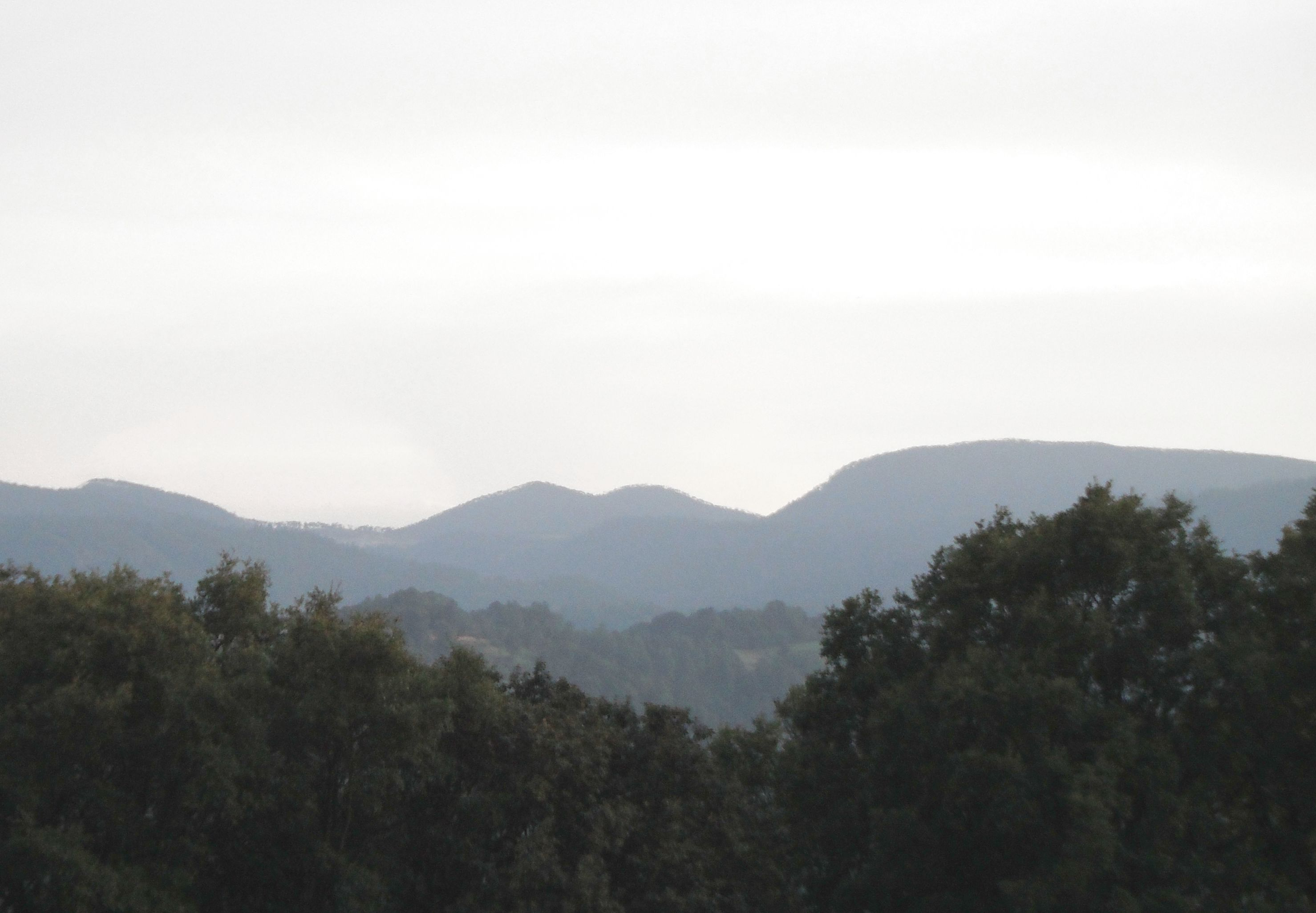 vista de los bosques de cahuacan